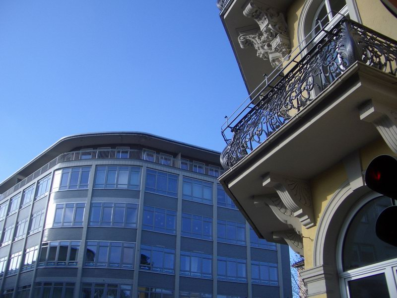 Die Ecke Bahnhofstraße und Westanlage in Gießen, Architektur der Wiederaufbauzeit und der Gründerzeit.